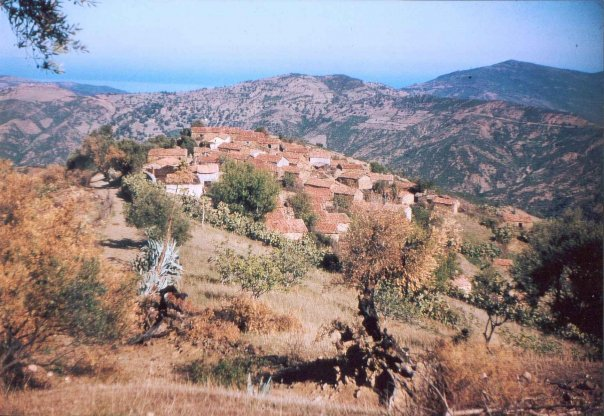 Photographie du village réalisée en 1956.